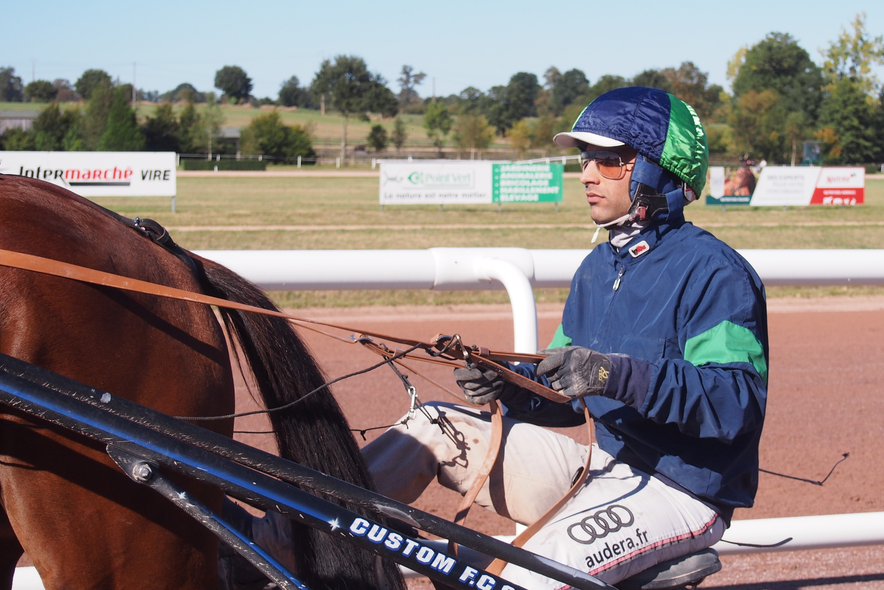 Gabriele Gelormini au sulky de Fix It, le 26 septembre 2018 sur l'hippodrome Robert-Auvray à Vire (Normandie, France).